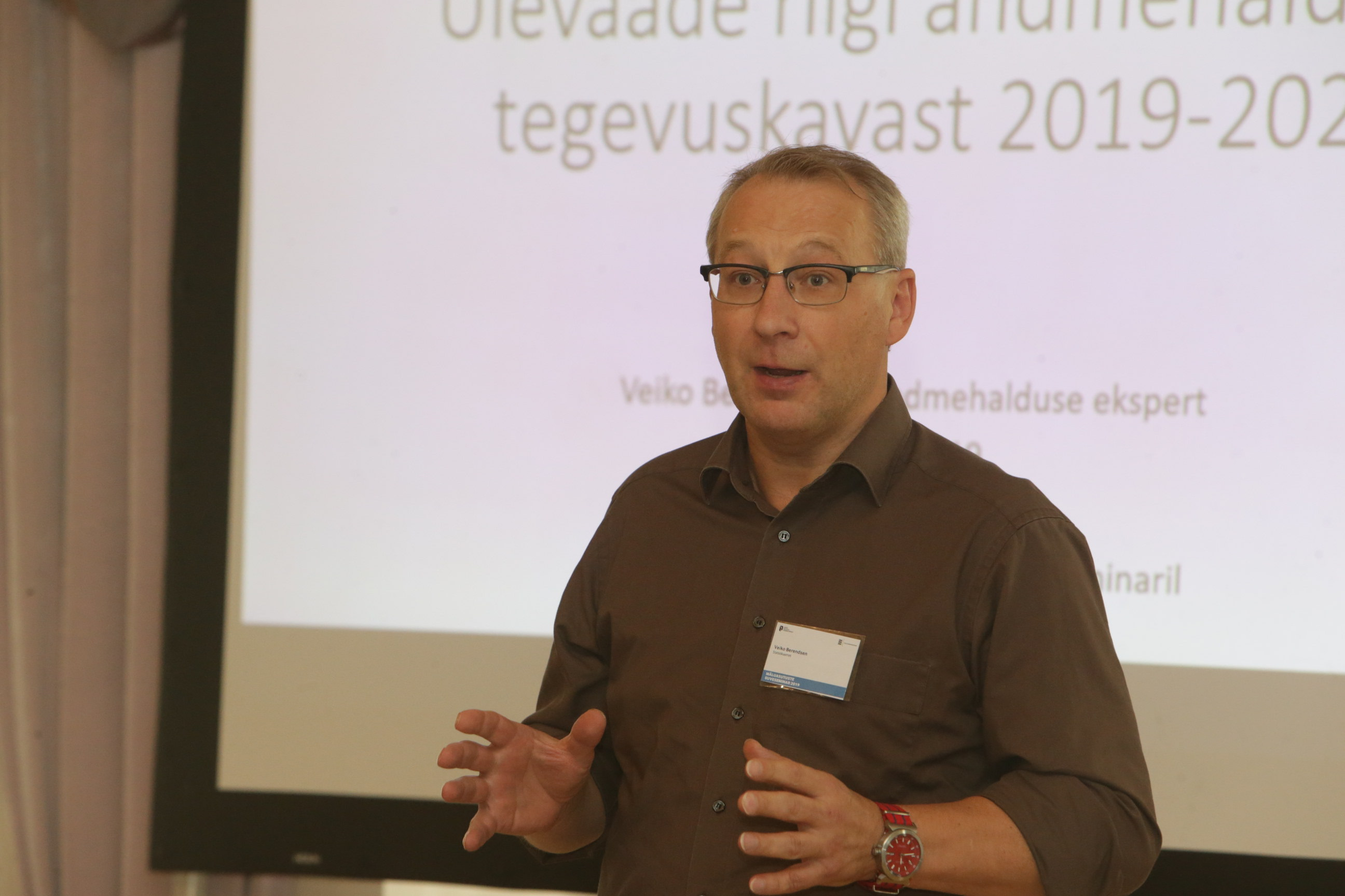 Eesti mäluasutuste suveseminar Sagadi mõisas Lääne-Virumaal pealkirjaga "Inimesed, andmed ja kratid – nende koostoimimise võimalikkusest". Kõneleb Veiko Berendsen.